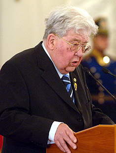 Igor Gorynin